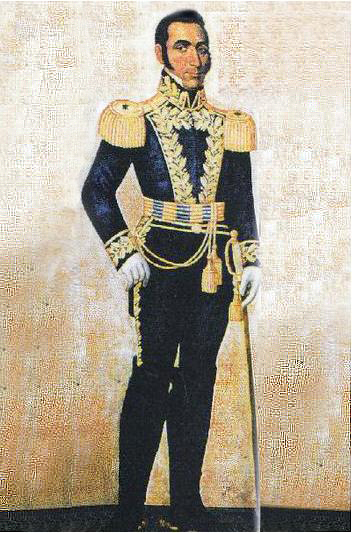 Foto Oficial del General Manuel A. de Luzárraga y Echezurria